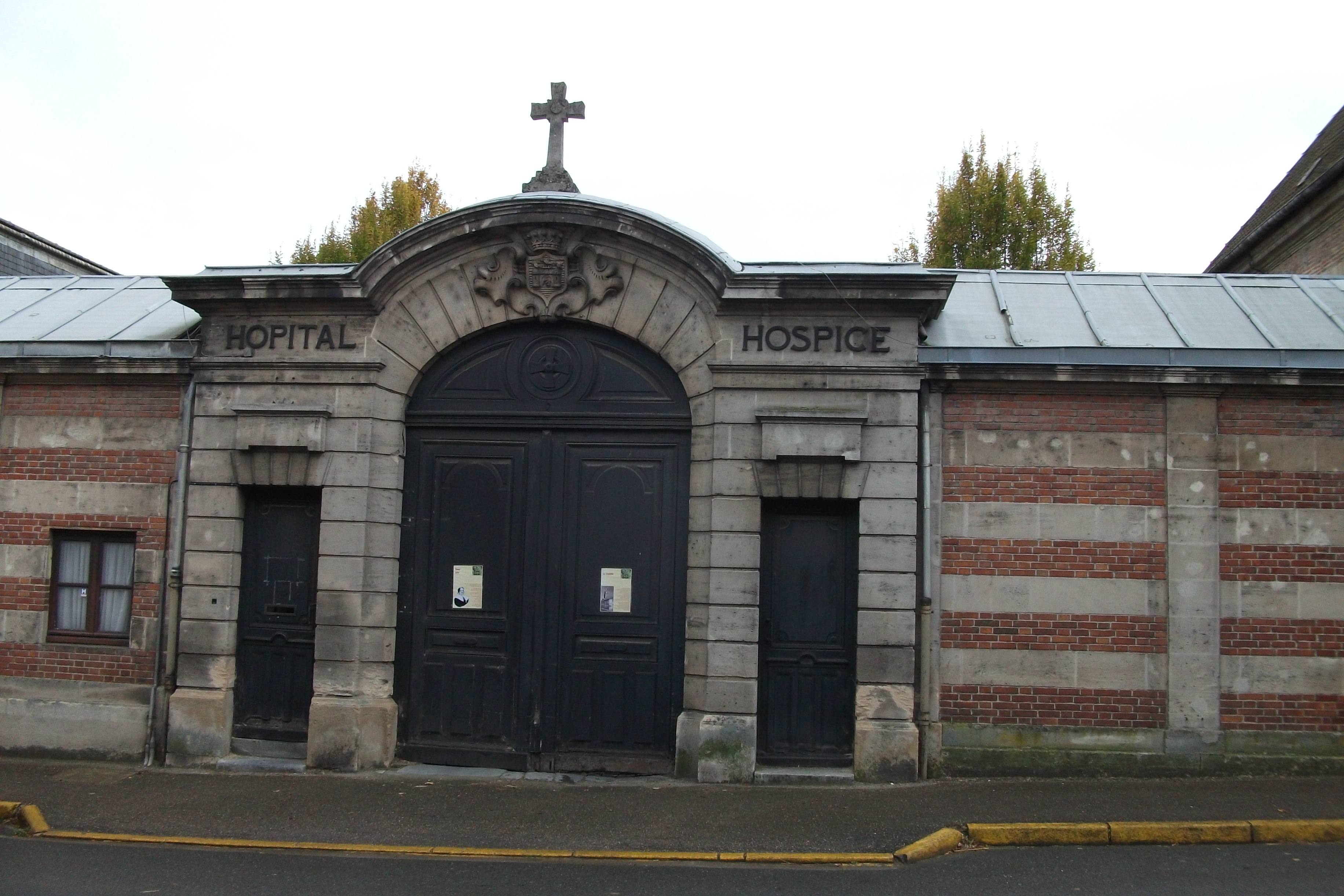 Hospice de Sainte-Ménehould construit vers 1691, recontruit dans le style gaize et briques vers 1748.